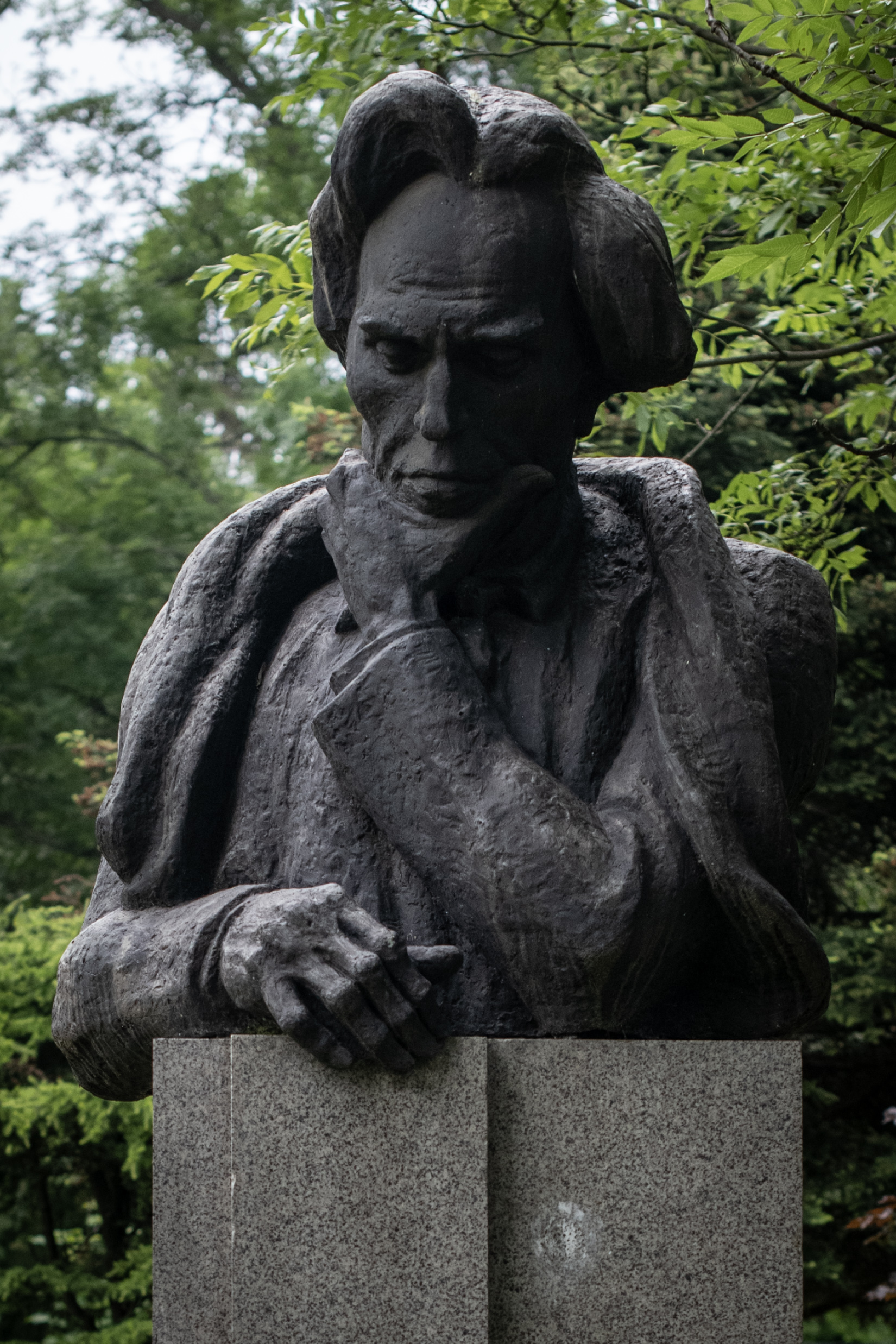 Снимката документира паметника на Иван Фунев в парк "Борисова градина", София